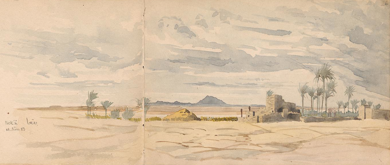 Baq`a's Salt flat